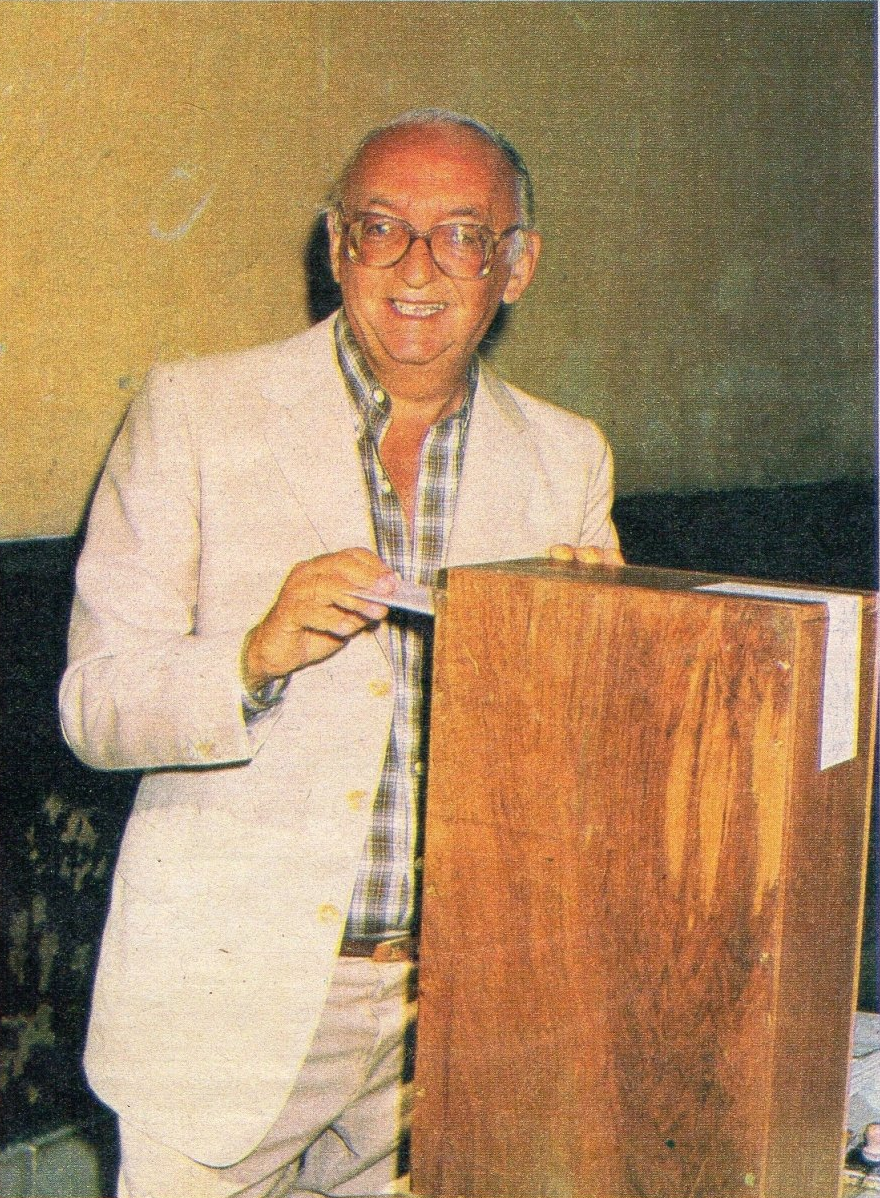 Bernardo Neustadt votando en las elecciones presidenciales de Argentina de 1983, que marcaron la restauración definitiva de la democracia en dicho país.